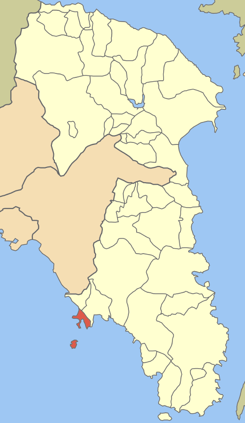 Locator map of Vouliagmeni municipality (Δήμος Βουλιαγμένης) in East Attica Nomarchia (Ανατολικής Αττικής) in Greece.